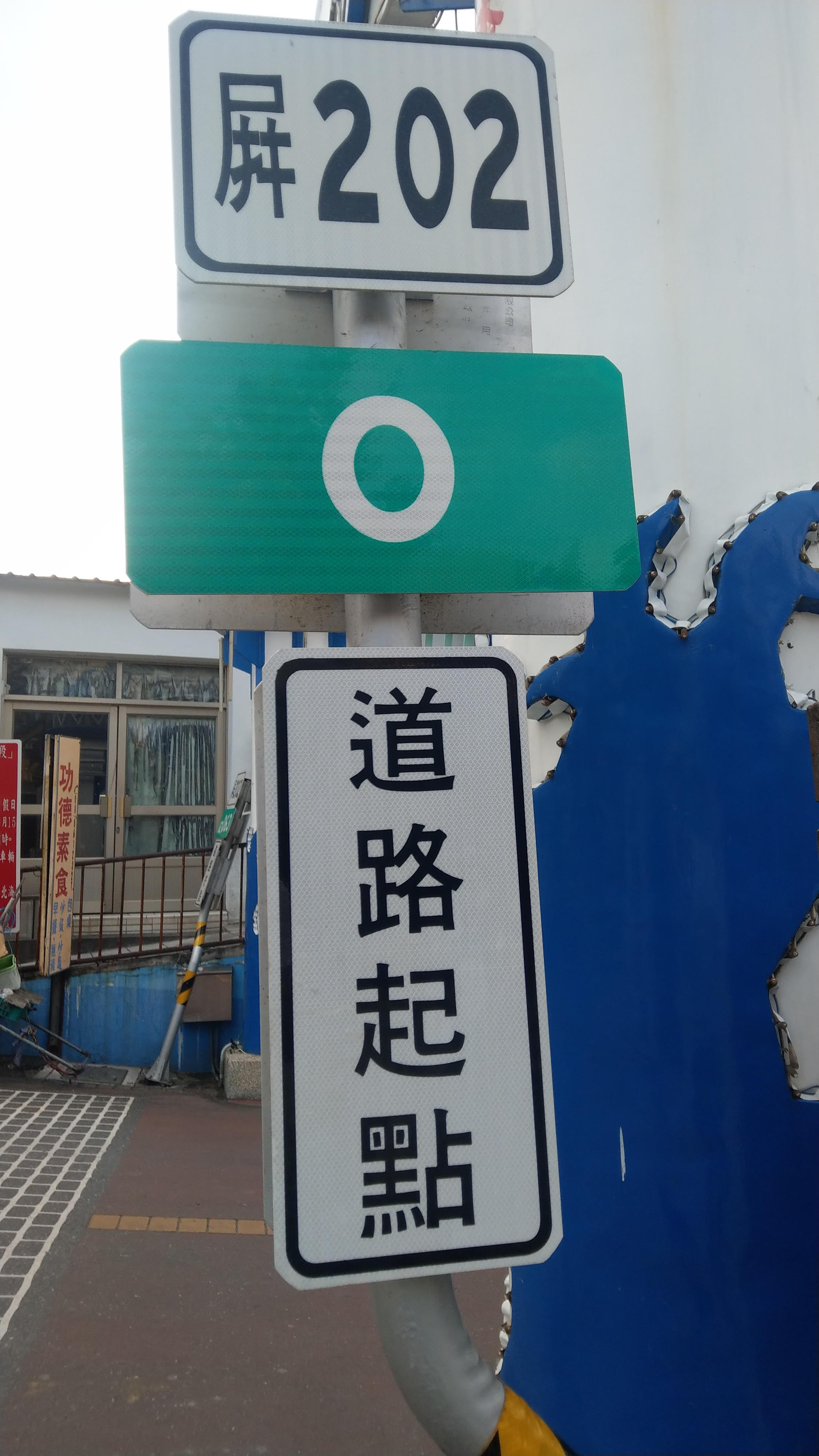 中文（台灣）: 鄉道屏202線起點